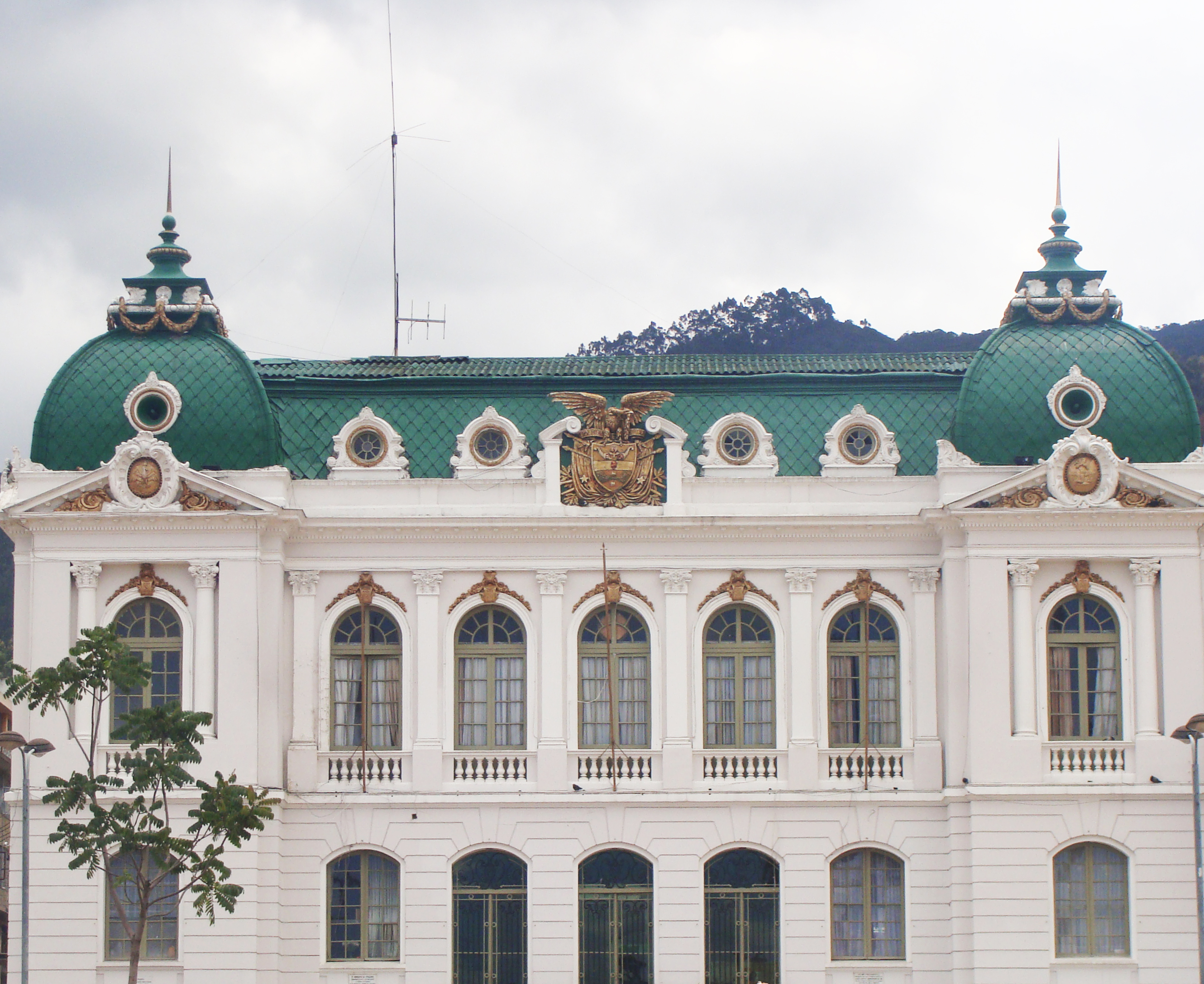 Ubicación: ZIPAQUIRA, CUNDINAMARCA